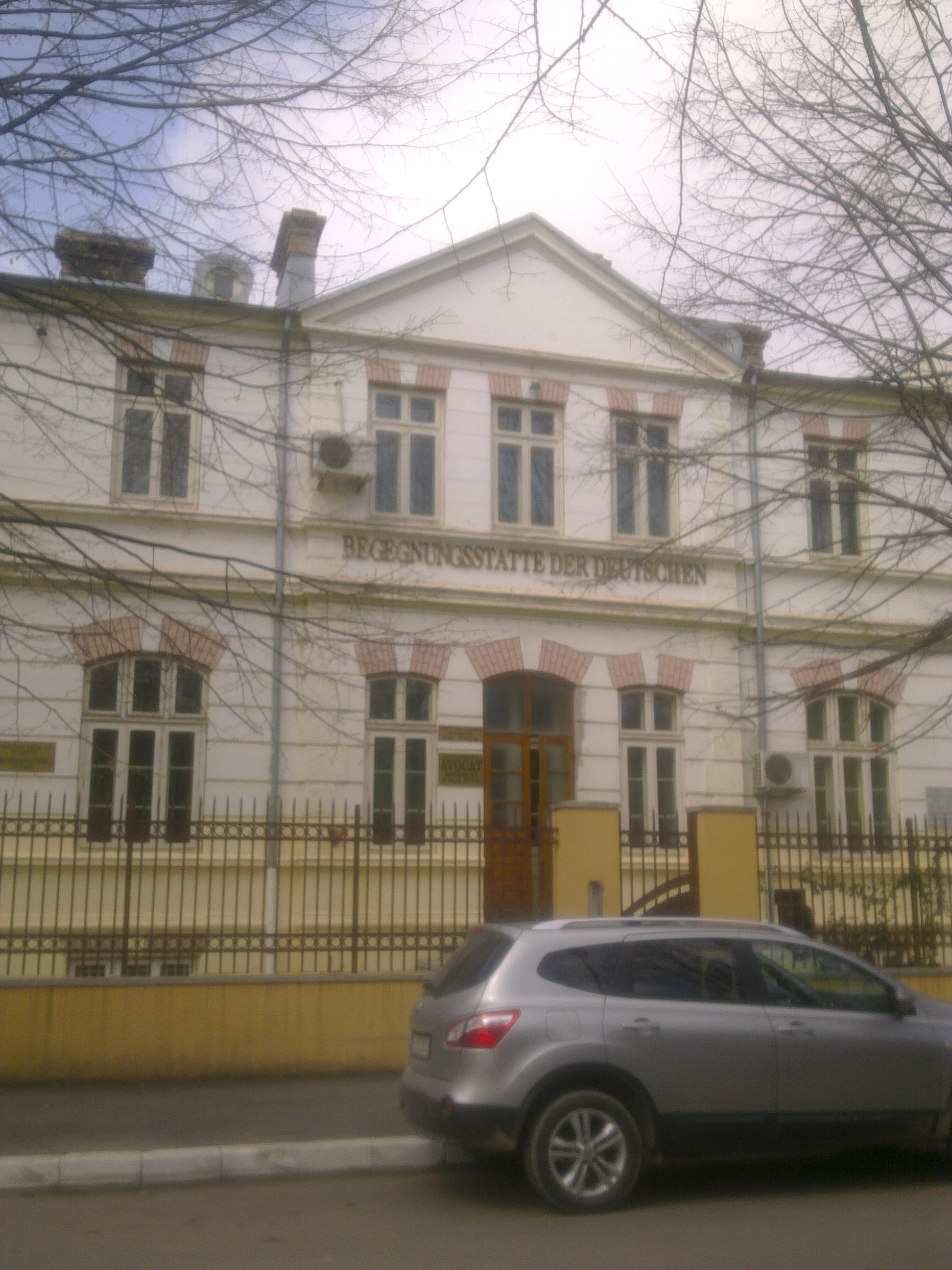 Begegnungsstätte der Dobrudscha-Deutsche, Constanza, Rumänien